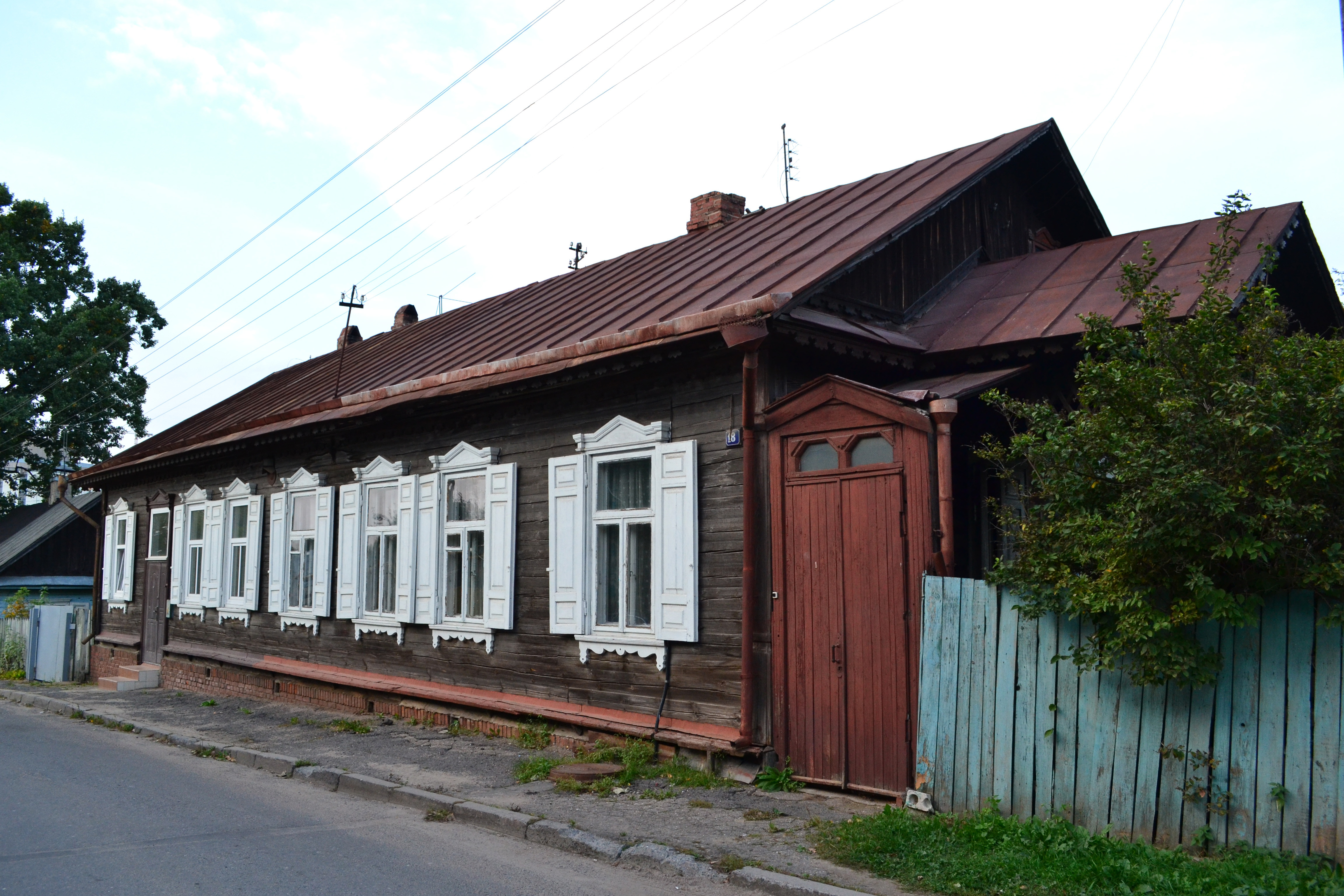 Беларуская (тарашкевіца): Комплекс драўлянай забудовы па зав. Паўночным, м. Менск. This is a photo of Belarusian heritage monument. Reference number: 713Г000212 ( WLM)